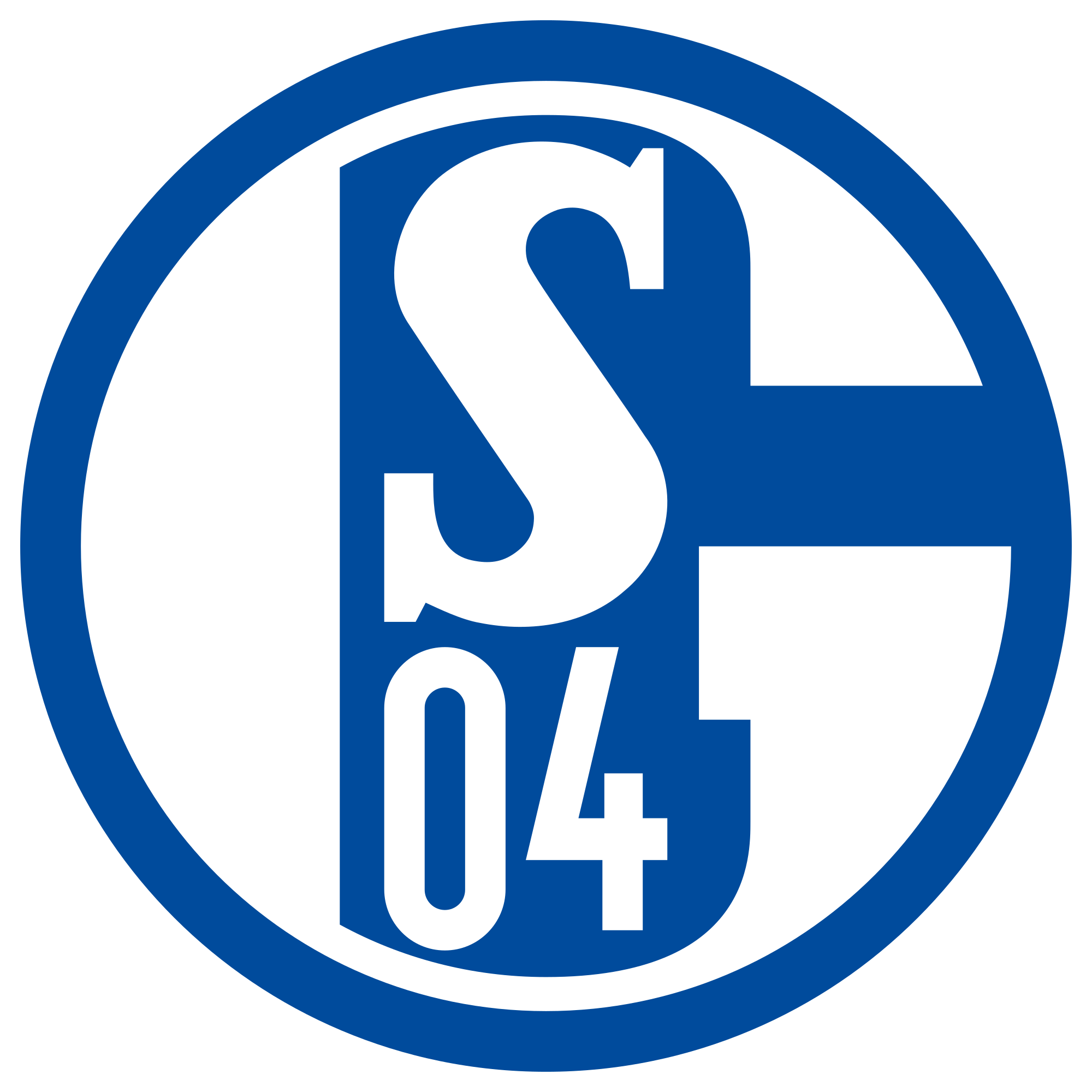 Logo des FC Schalke 04